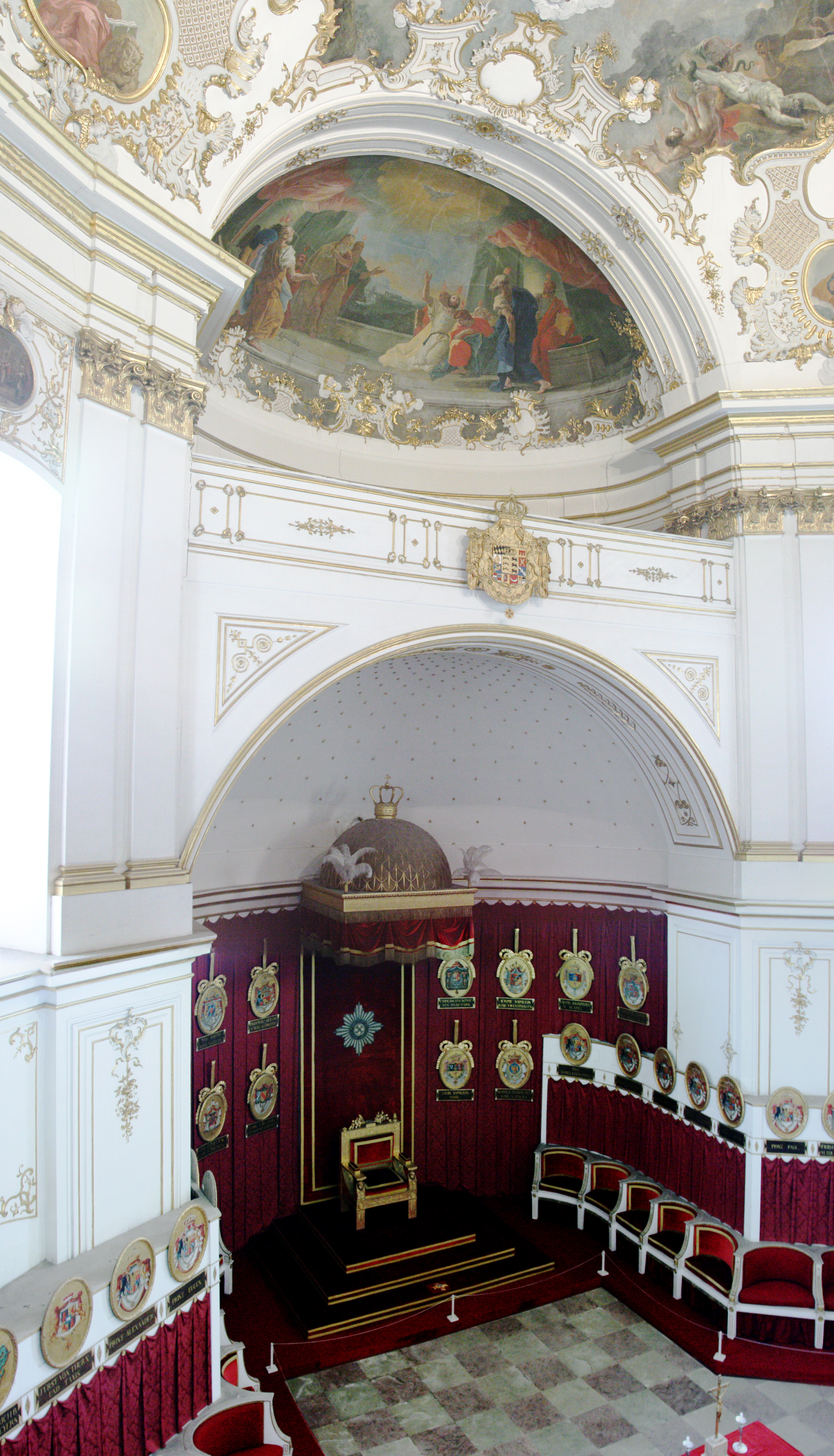 Ordenskapelle und evangelische Schlosskirche im Residenzschloss Ludwigsburg. Das Deckengemälde der Ordenskapelle wurde von Livio Retti im Jahr 1747 erstellt.